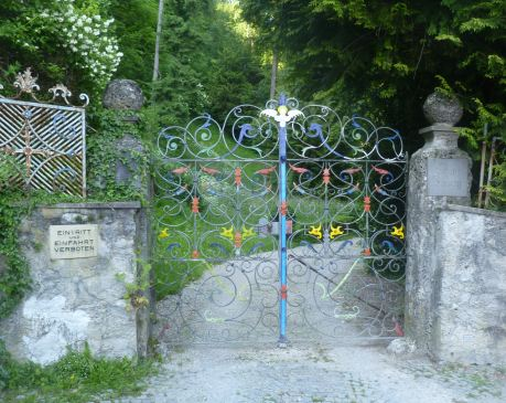 Schloss_Fürberg-Einfahrt-neu